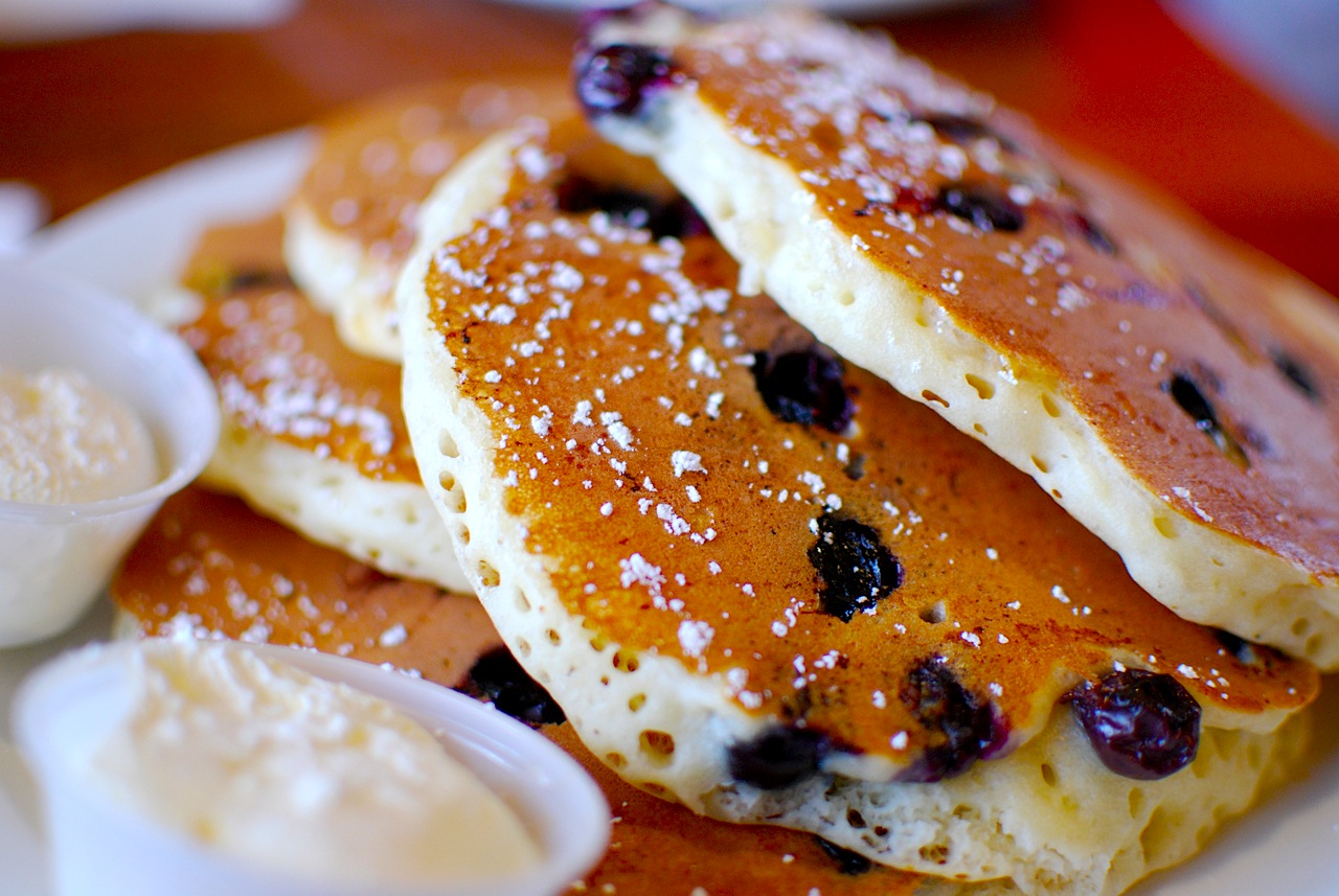 blueberry pancakes